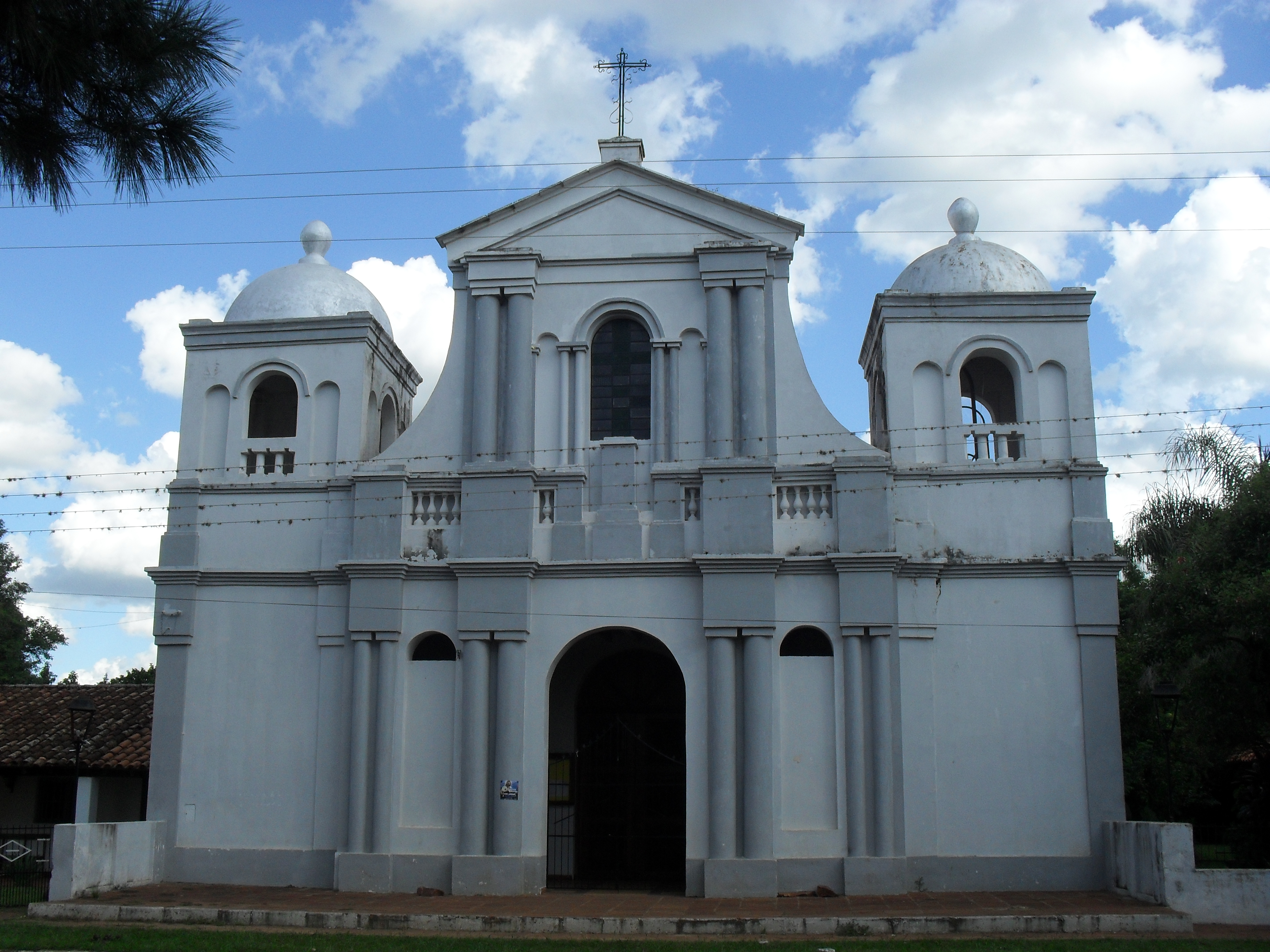 Vista frontal de la Iglesia de Santiago Misiones